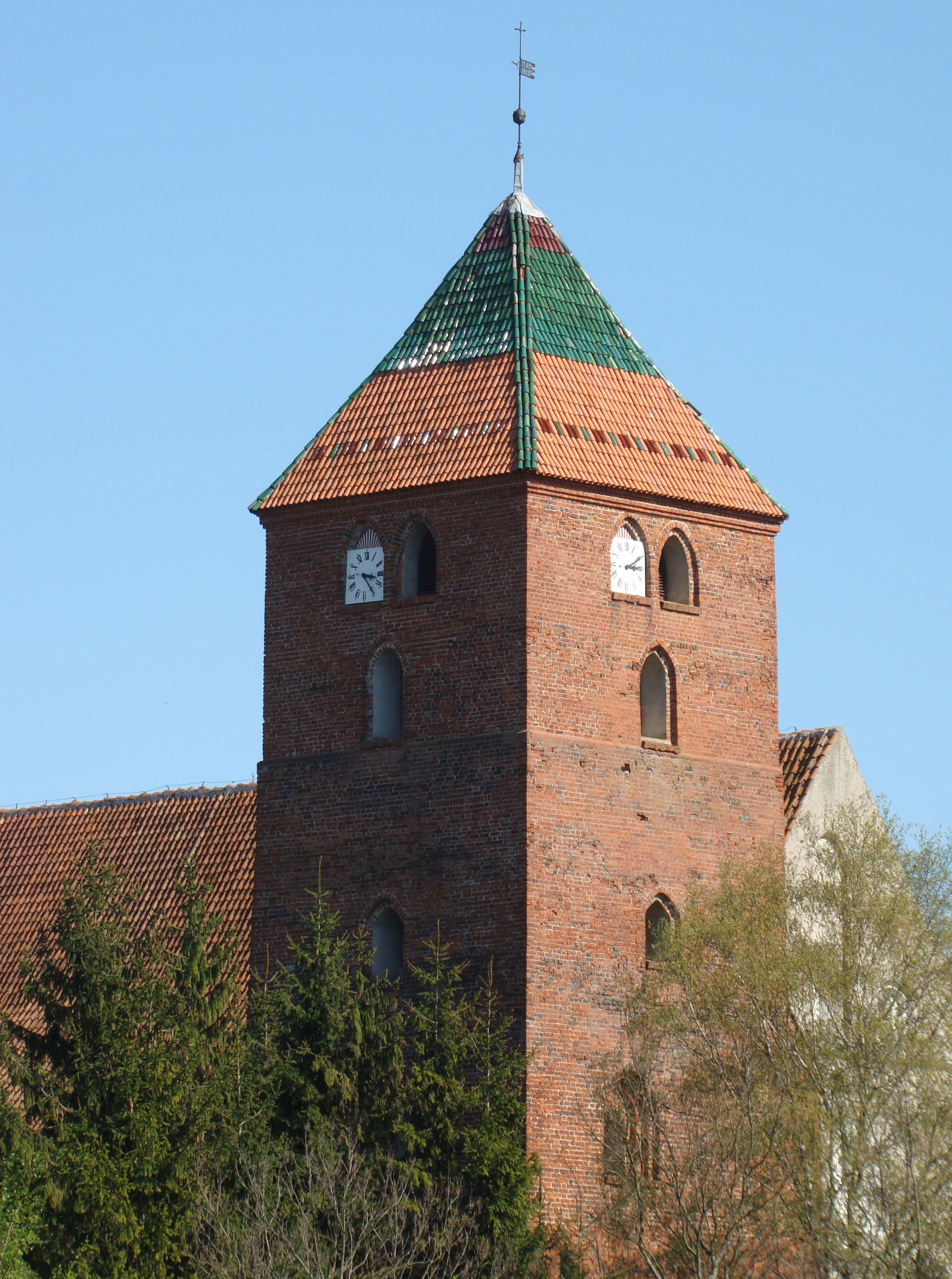 Młynary - kościół parafialny p.w. św. Piotra Apostoła (zabytek nr 618/69 z 28.02.1968)